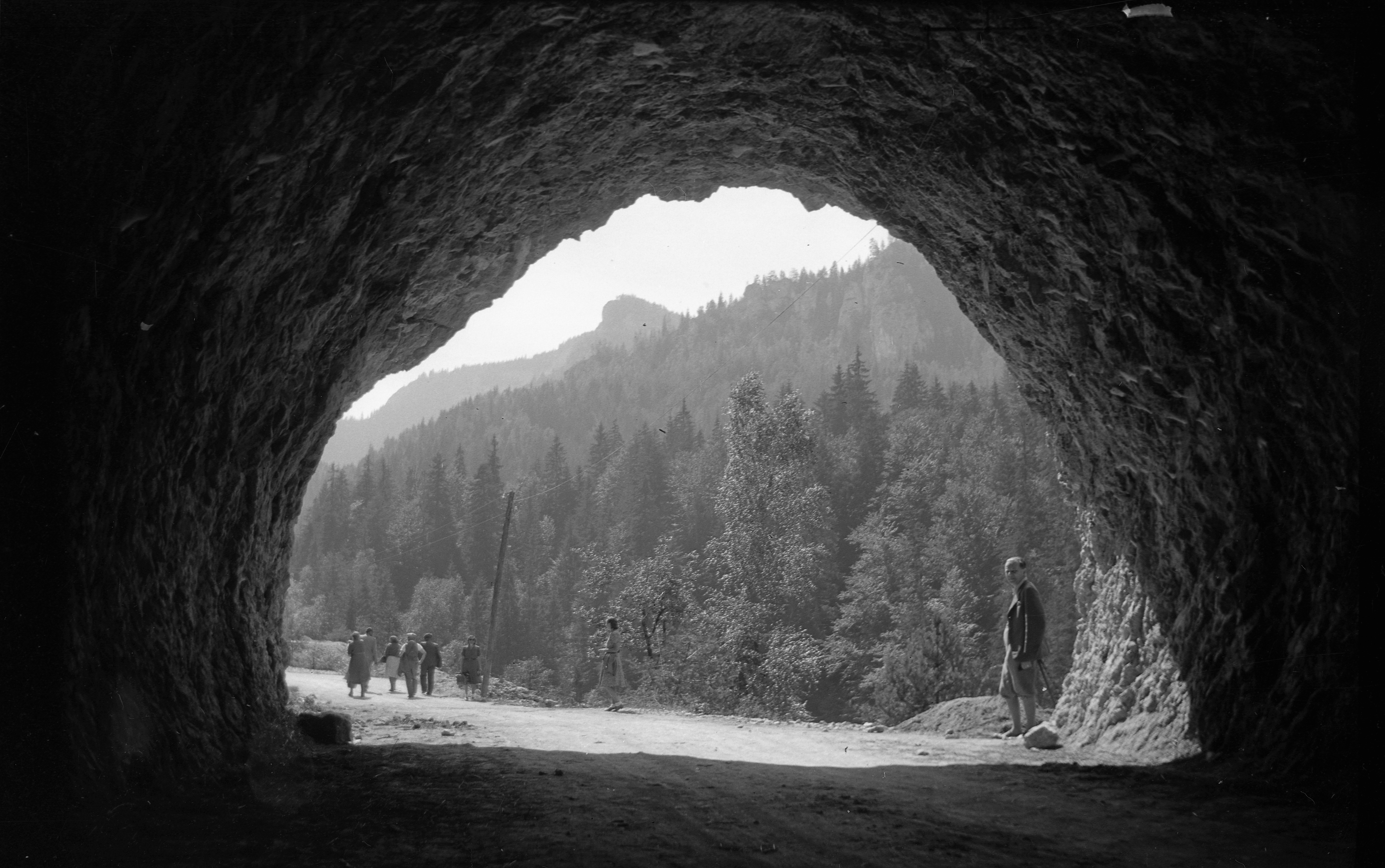 közúti alagút. Location: Romania, Transylvania, Bicaz Canyon Tags: tunnel Title: közúti alagút.